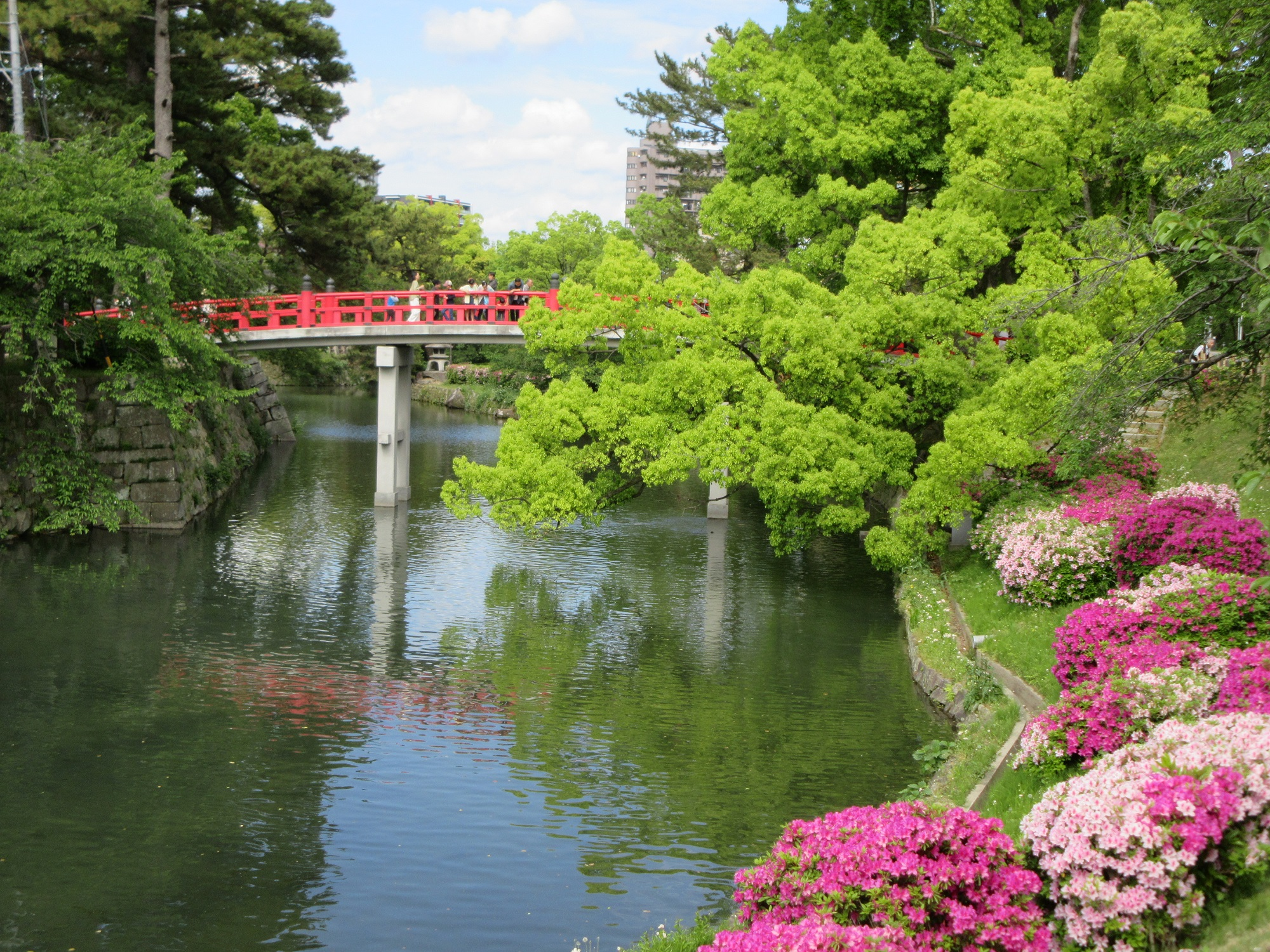 龍城堀（たつきぼり）と神橋（しんきょう）